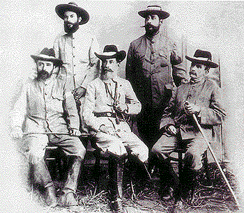 Manuel Antonio Matos y los lideres de la Revolución Libertadora